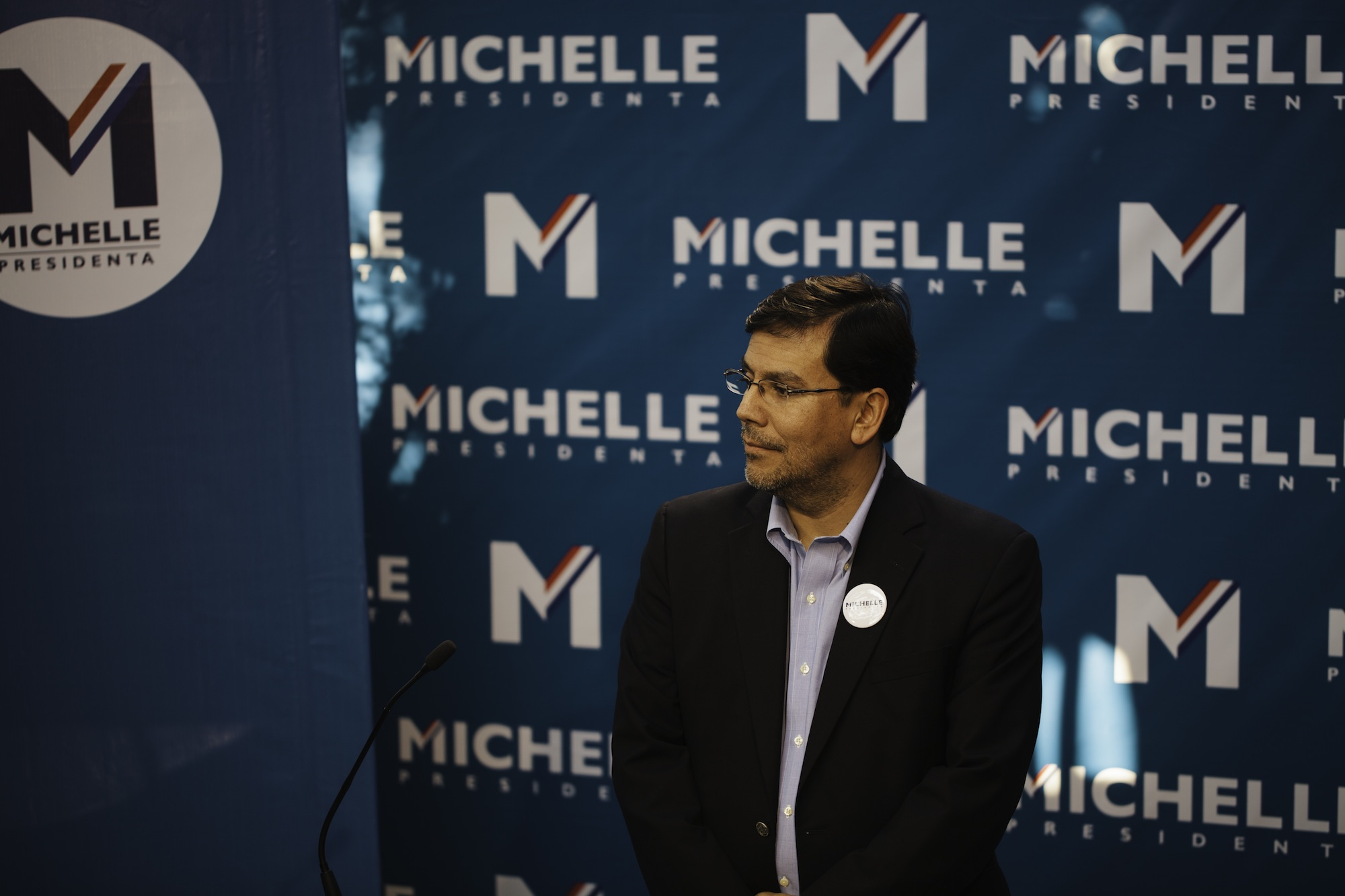 Michelle Bachelet presentó en la tarde de ayer a su equipo de campaña para las primarias de junio de este año. El grupo de trabajo está conformado por personas heterogéneas que unen juventud y experiencia. También estrenó la casa que su será su comando a partir de ayer. “Que alegría poder recibirlos a todos en este lugar físico desde donde desplegaremos nuestro trabajo para construir un programa y una mayoría diversa por un lado, y contundente por el otro”, señaló.